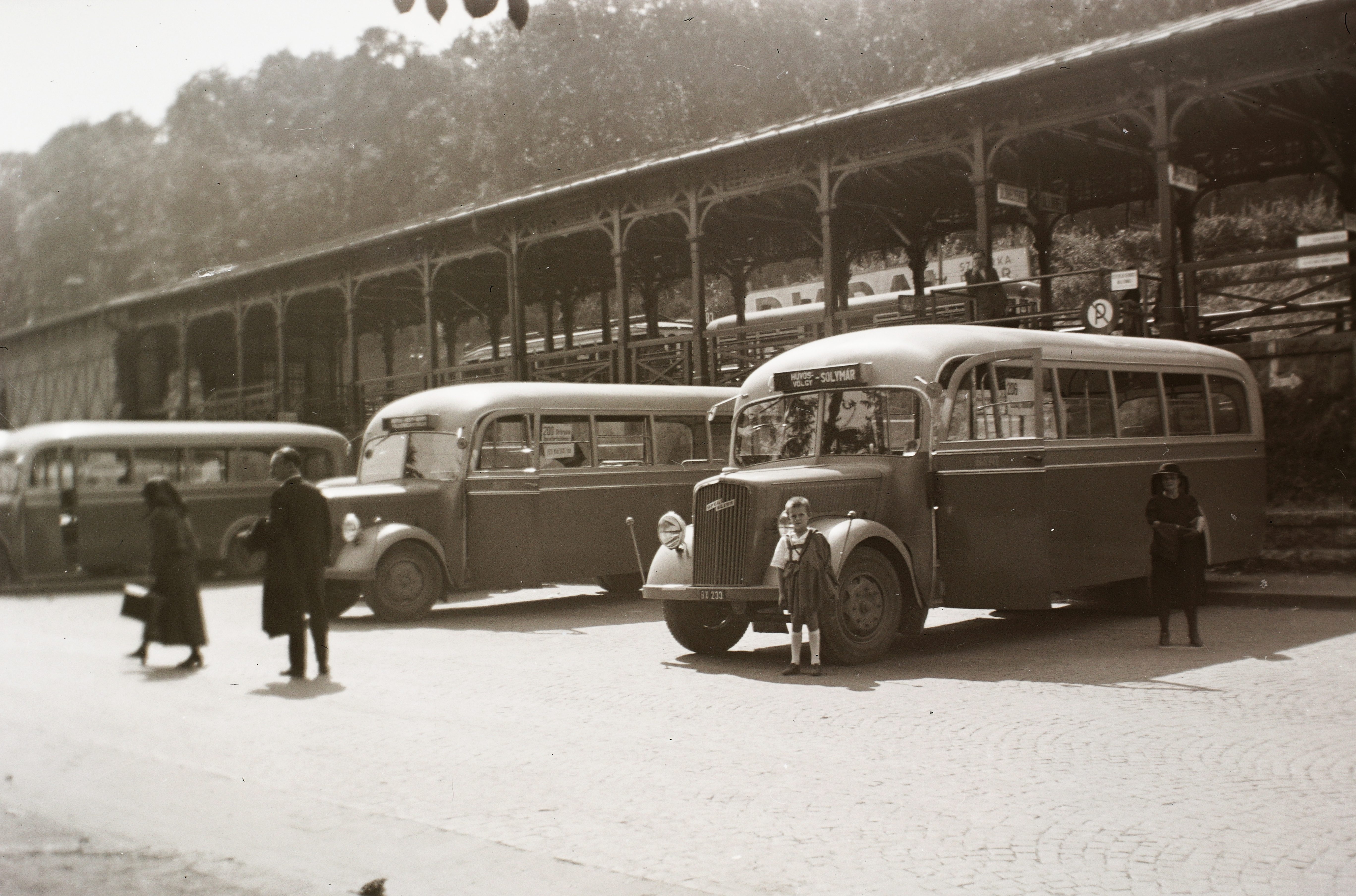 Hűvösvölgyi autóbusz és villamos végállomás. Location: Hungary, Budapest II. Tags: bus stop, Gerrman brand, Opel-brand, Budapest, number plate, bus, destination sign, road sign Title: Hűvösvölgyi autóbusz és villamos végállomás.